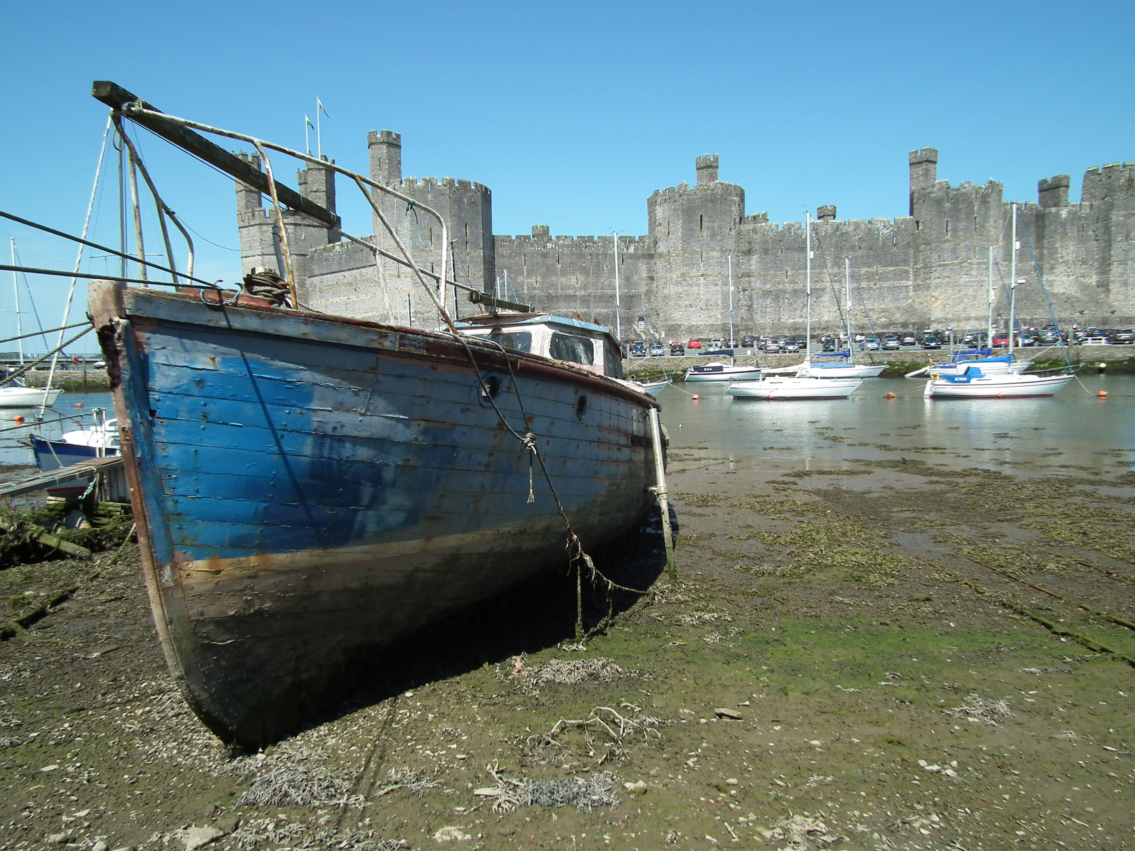 Cwch yn Harbwr Caernarfon